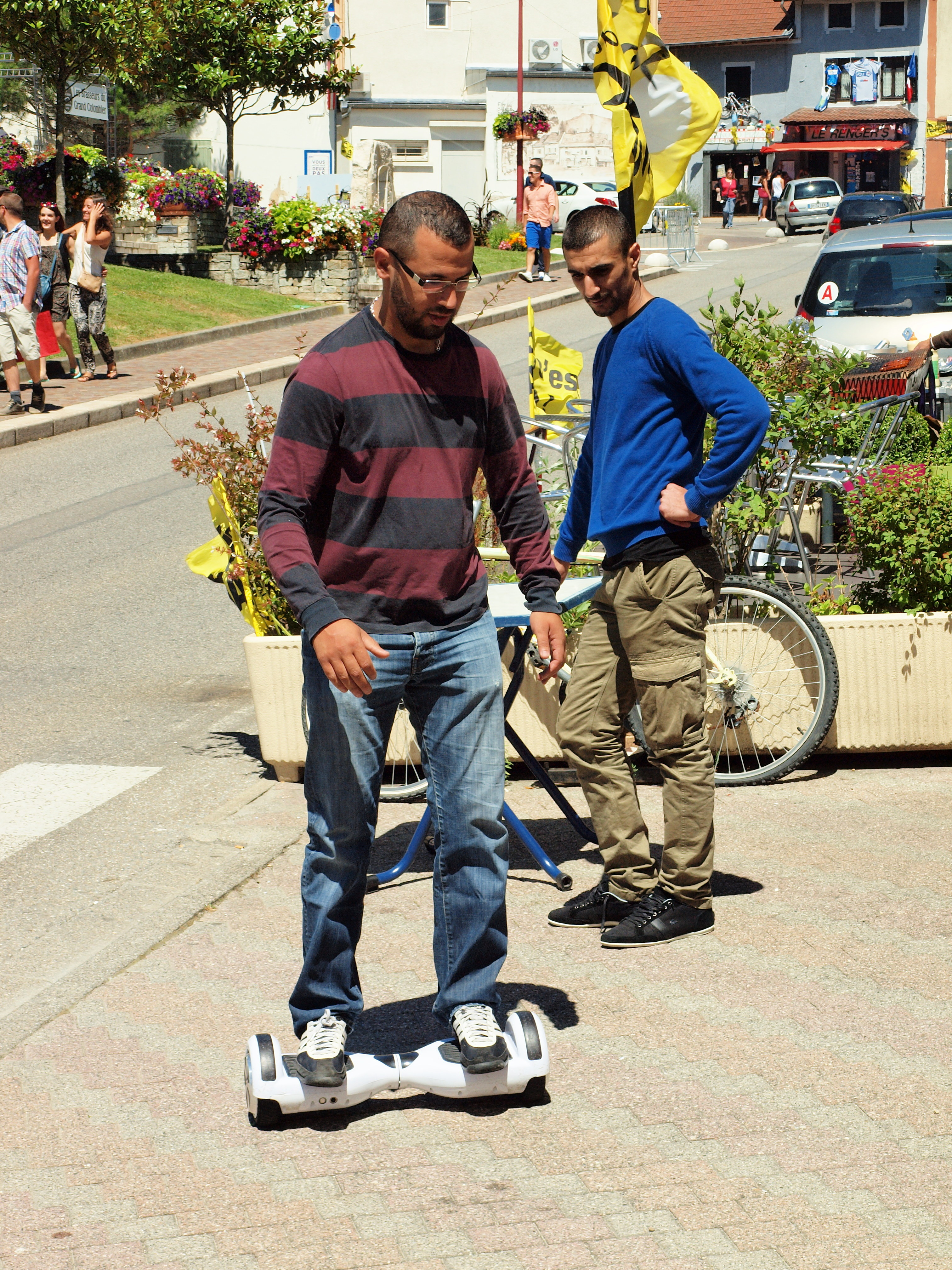 Culoz (Ain, France) ; le samedi 16 juillet 2016, jour de la foire au vin, de l'omelette géante, et même de la dégustation de la Bière du Grimpeur, et surtout veille de l’arrivée de la 15e étape du Tour de France. Le tout dans une ambiance bon enfant.